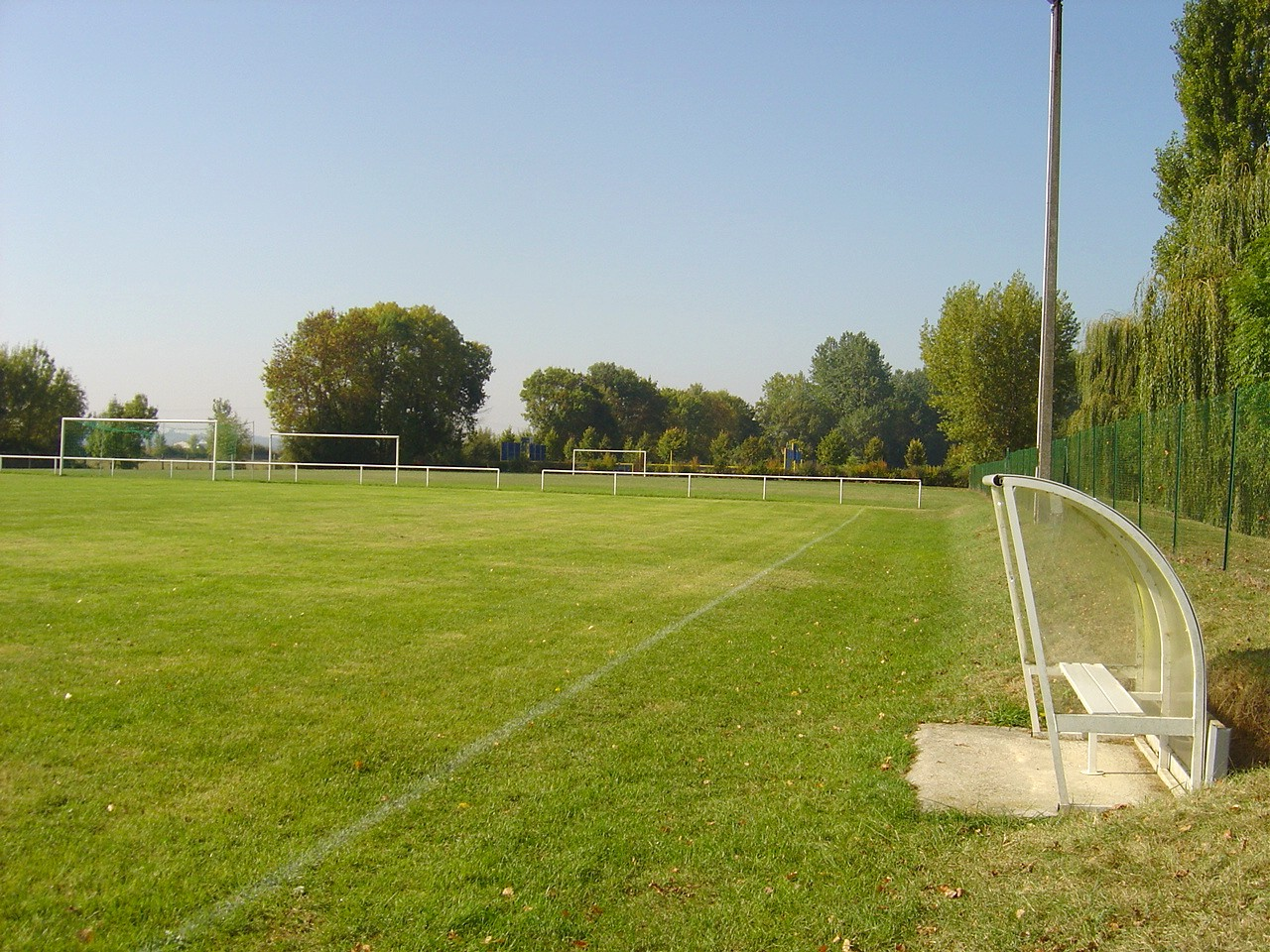 Vue des terrains de football de Limeray Indre et Loire France